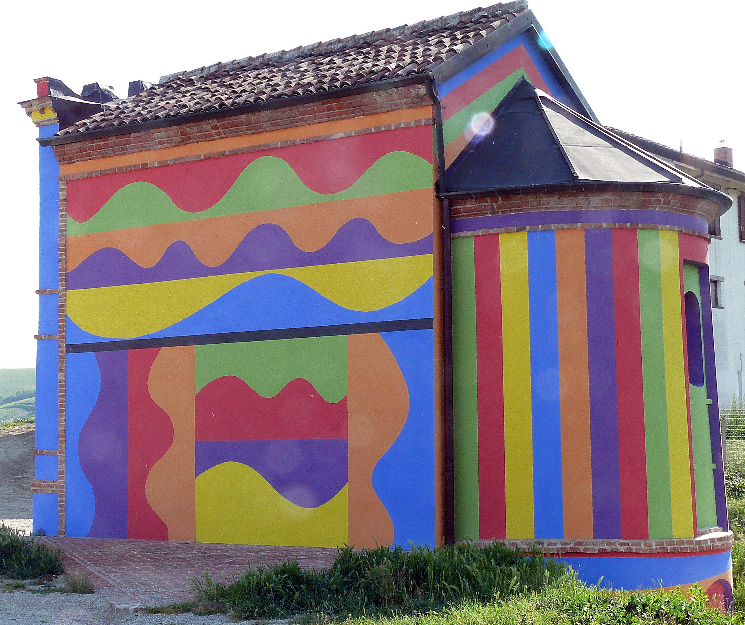 Die Cappella della Madonna delle Grazie bei La Morra